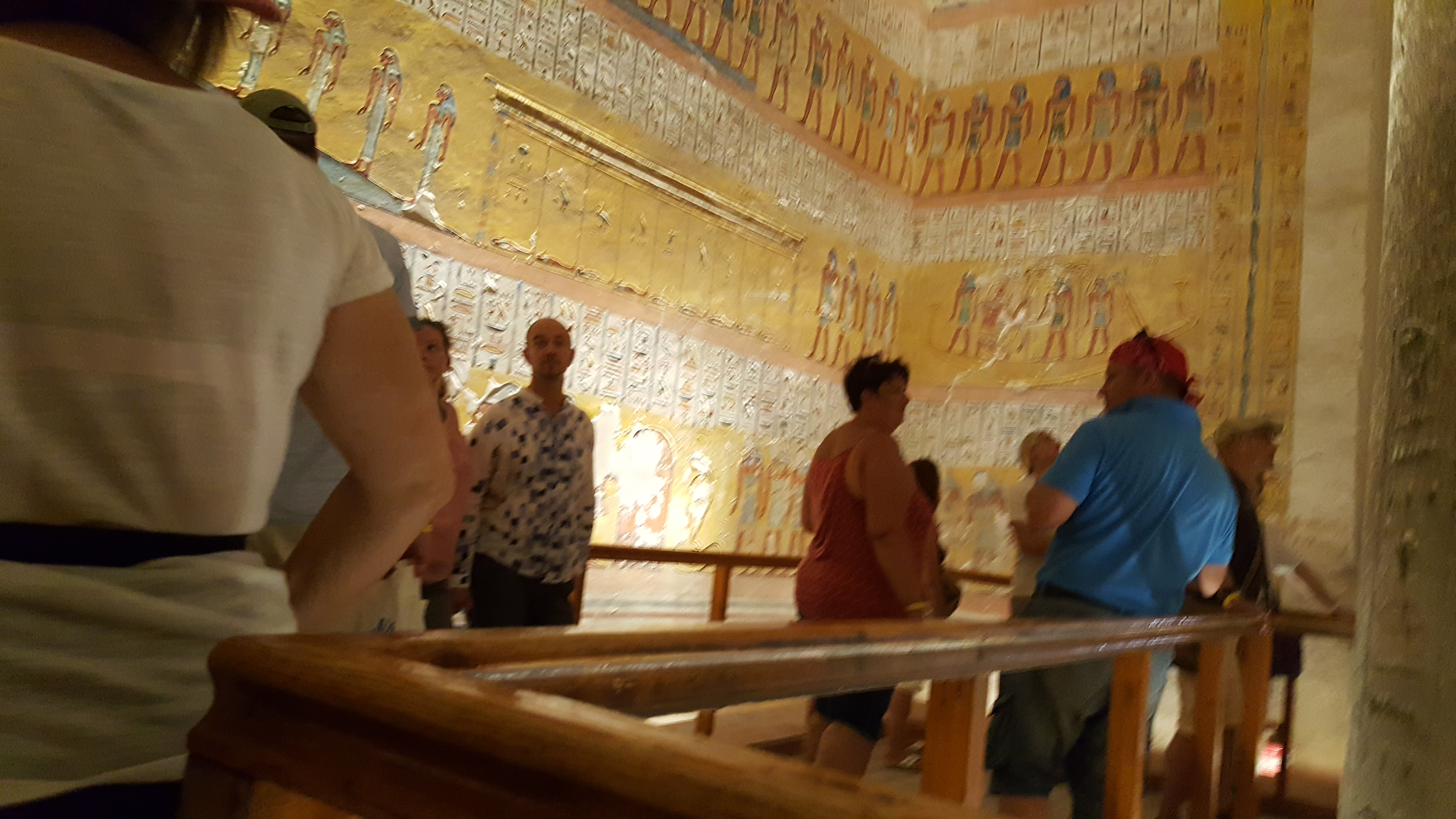 KV2 is the tomb of Ramesses IV, in the Valley of the Kings